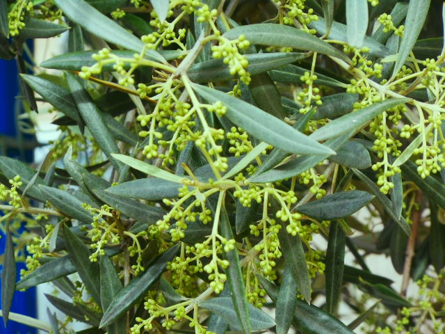 Olea europaea europaea europaea cultivar Lucquier (Montpellier, 2/05/2013 av. M. d'Angoulème) : inflorescences axillaires